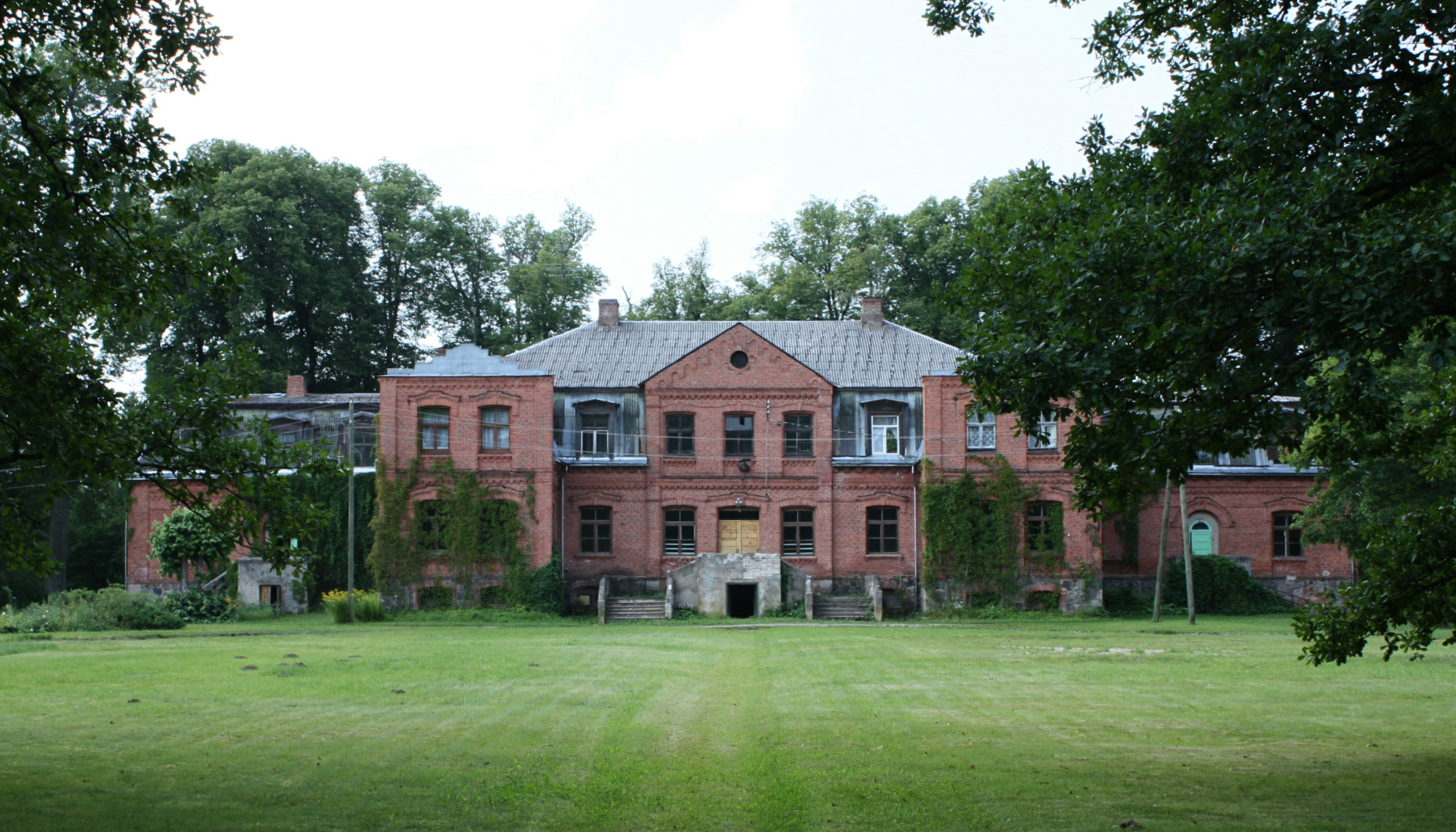 Katvari mõisa peahoone 2010. aastal